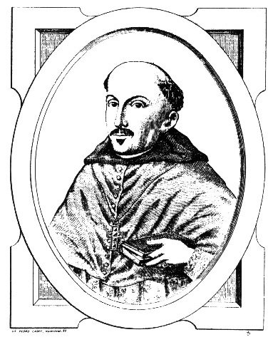 Fray Gaspar de Villaroel O.S.A. (Quito, 1587 - La Plata, 12 de octubre de 1665) fue un religioso de la Orden de San Agustín. Fue obispo de la arquidiócesis de Santiago de Chile (1637), de Arequipa y de la arquidiócesis de La Plata (Charcas).